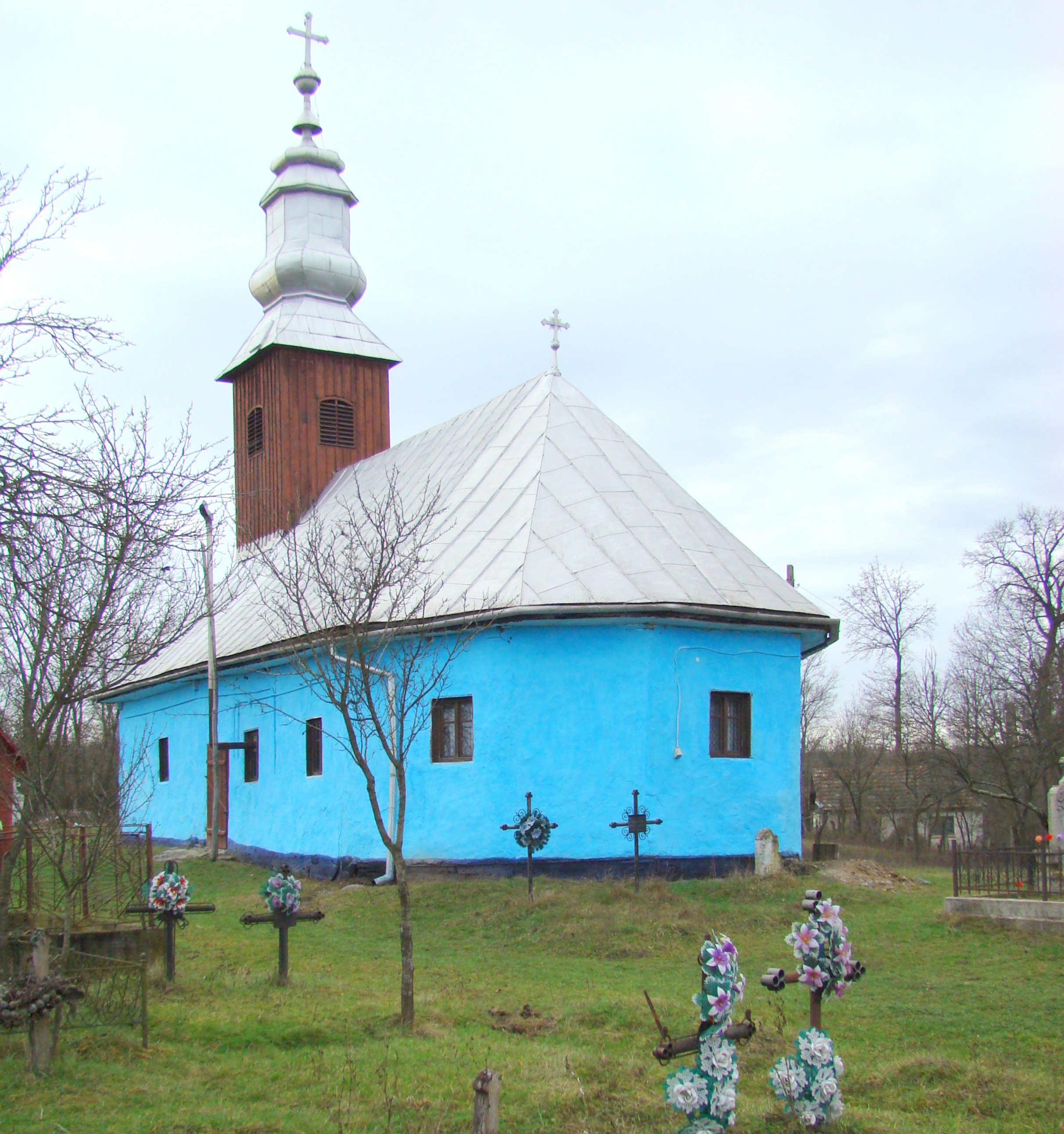 Dușești, Bihor